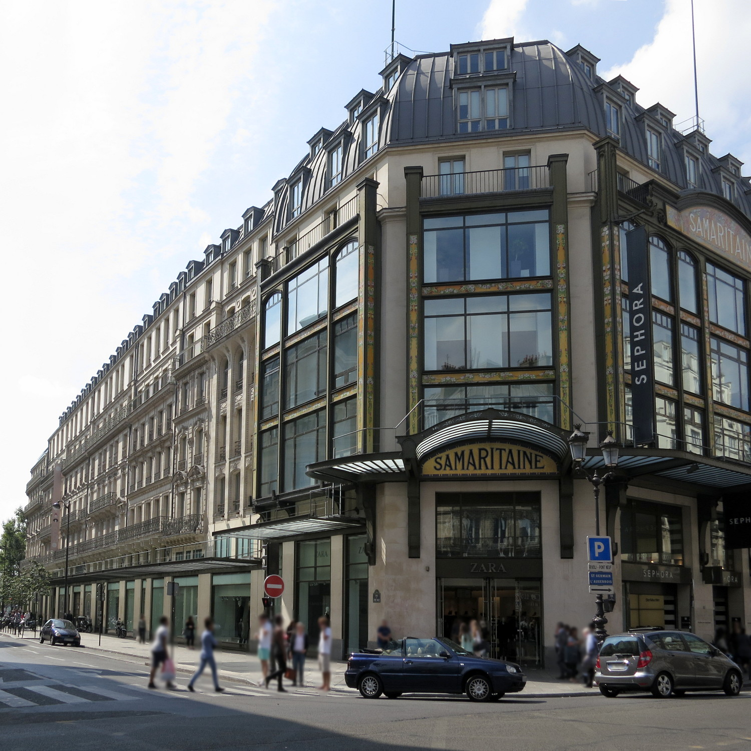 Vue du magasin 1 de la Samaritaine, à l'angle de la rue du Pont-Neuf et de la rue du de Rivoli à Paris